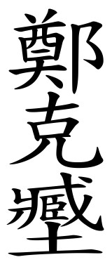 鄭克臧的名字正確寫法